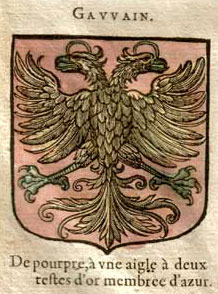 Gauvain Hierome de Bara